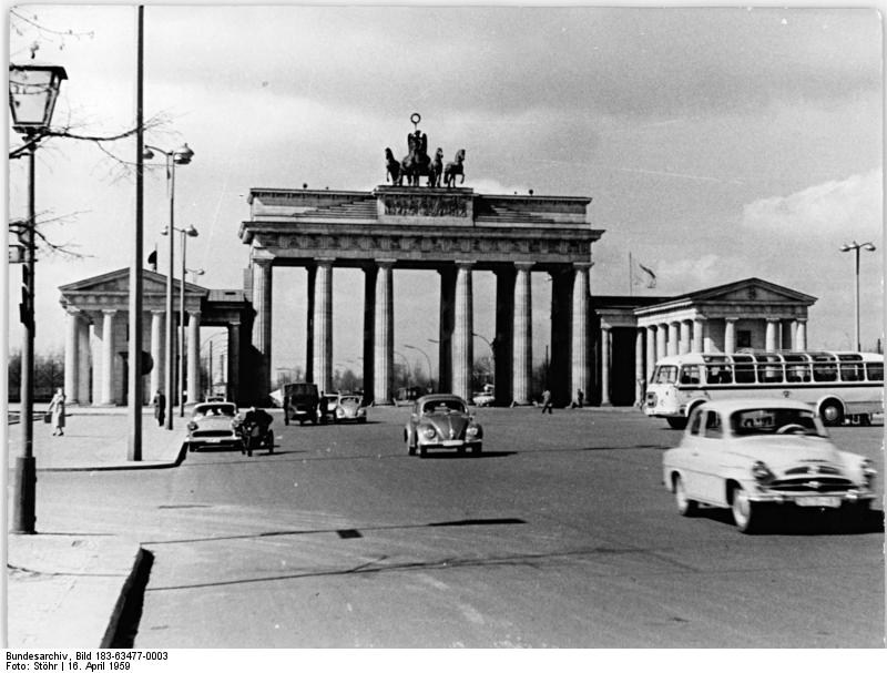 Berlin, Brandenburger Tor Zentralbild Stöhr Ho. 16.4.1959 Berlin: Stadtansichten von Berlin. Brandenburger Tor